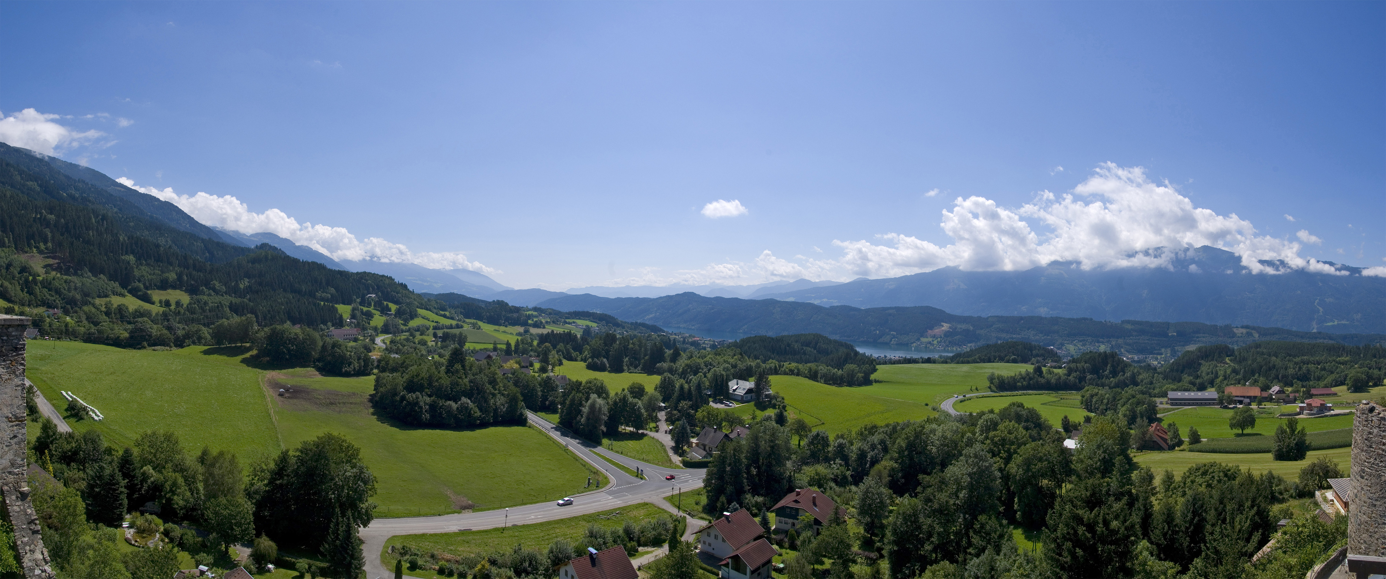 Panorama, geschossen von Burg Sommeregg in Österreich